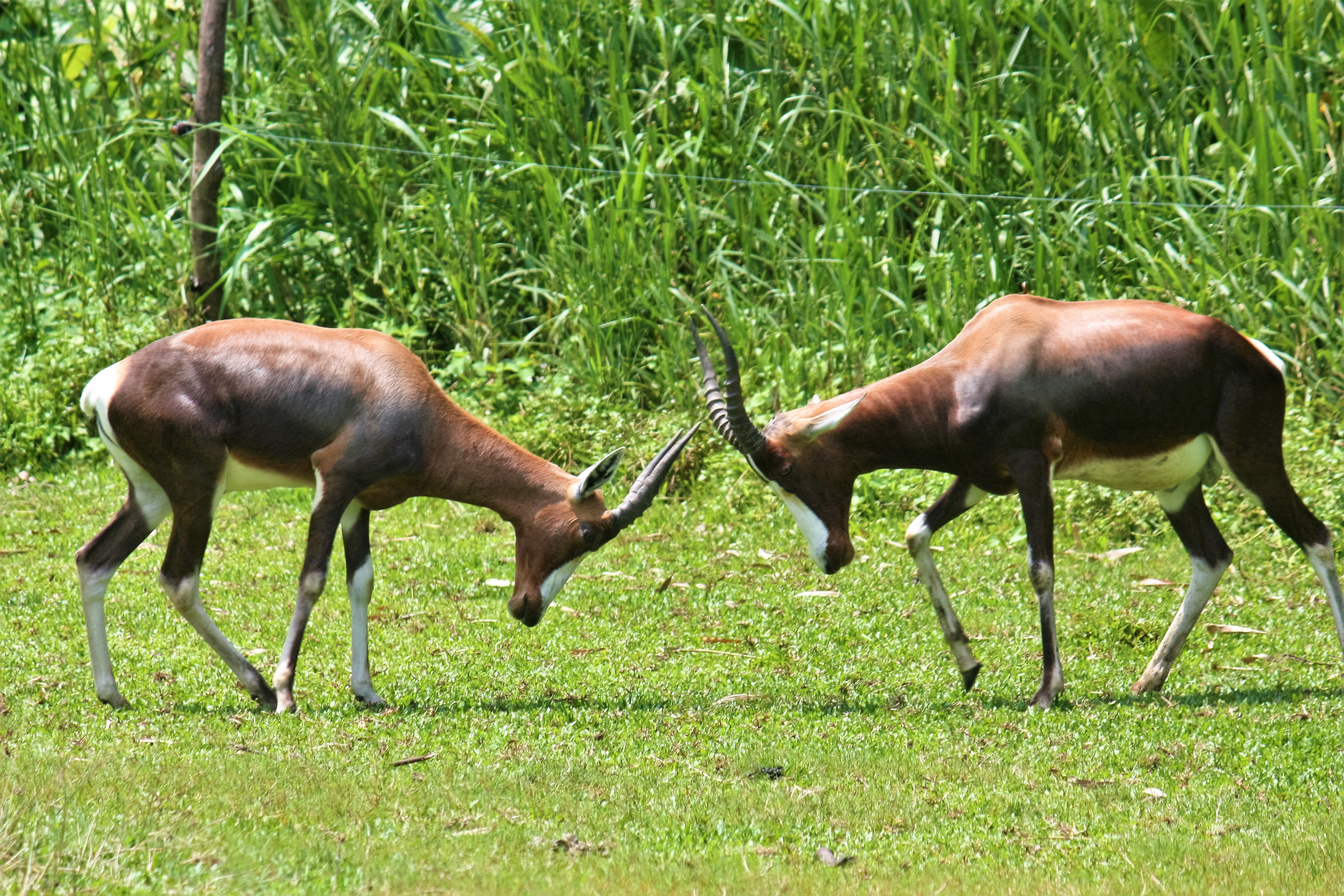 Zoo Guangzhou